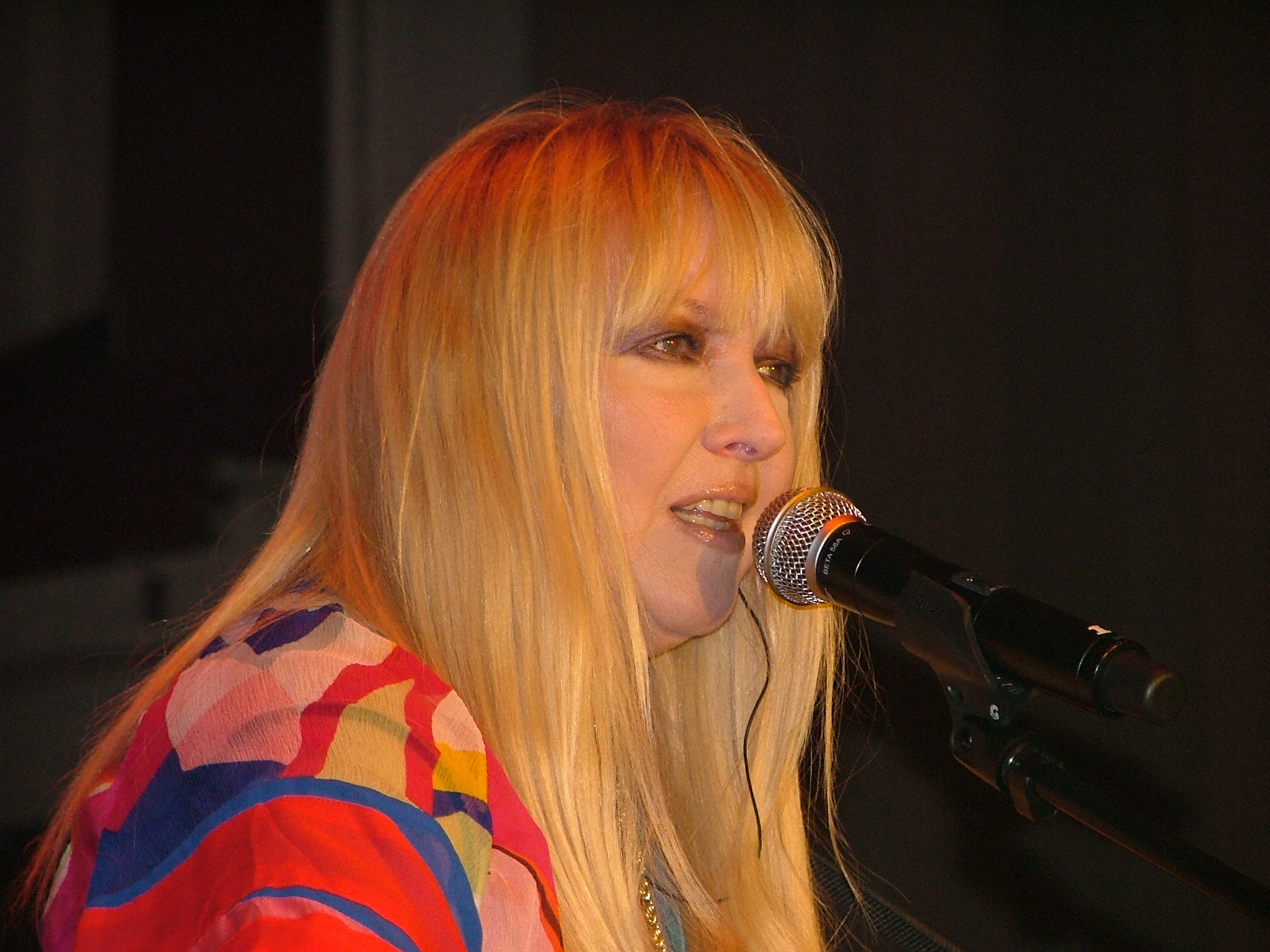 Centralne Obchody Święta Kolejarza 2007, Warszawa, Sala Kongresowa Maryla Rodowicz